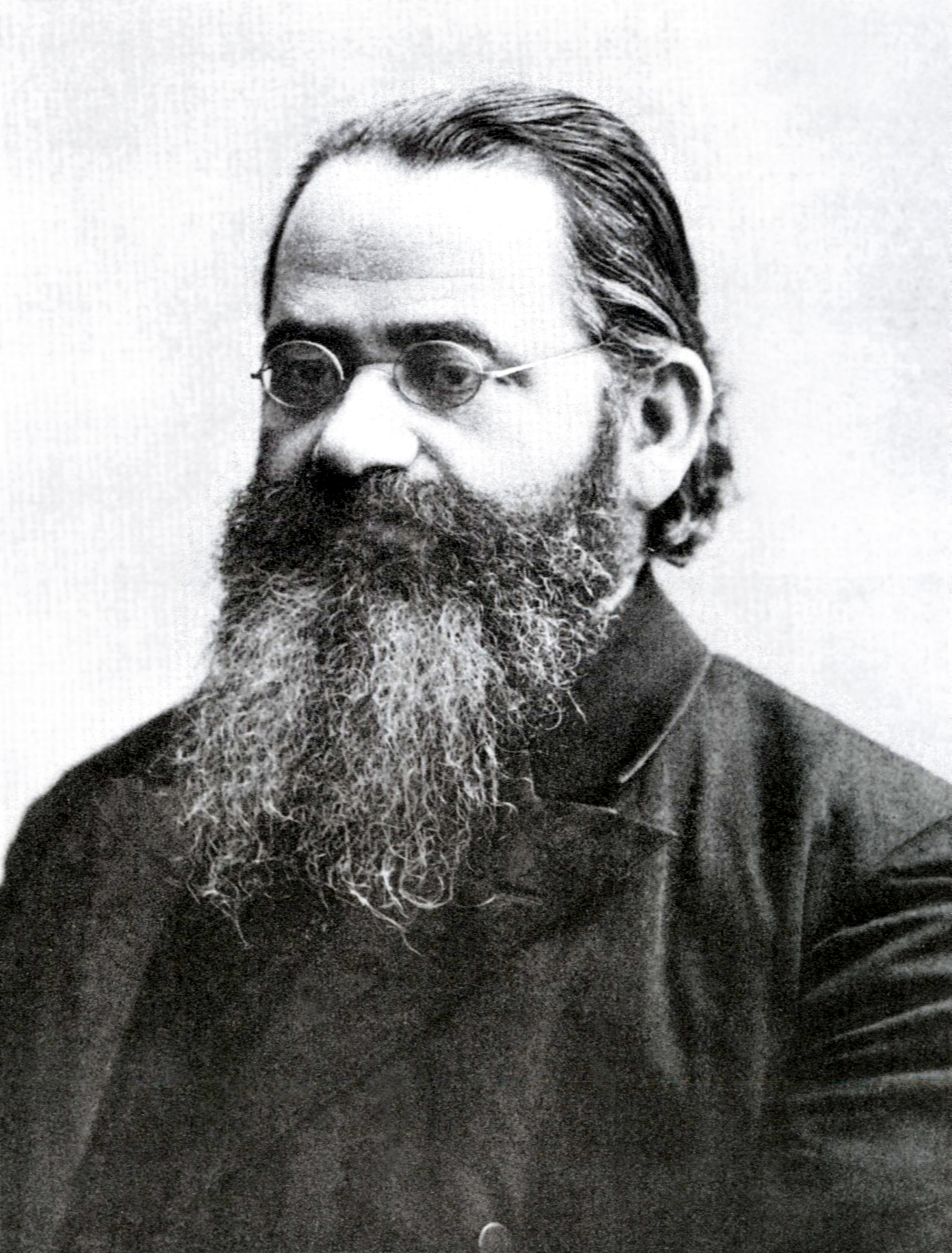 photo Семён Афанасьевич Венгеров (1855—1920), русский литературный критик, историк литературы, библиограф